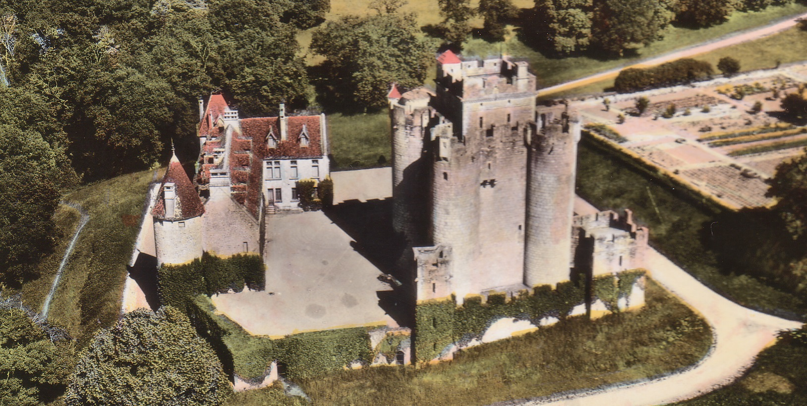 Fortification et donjon de Romefort propriété de Jeanne de Segonda et de Jean d´Harambure, dit le borgne.